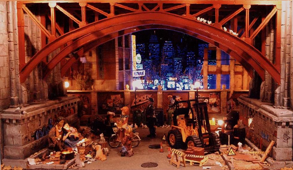 Diorama nacimiento moderno 2004 Casa de la Cultura (Villena) creado por la Asociación de Belenistas de Villena